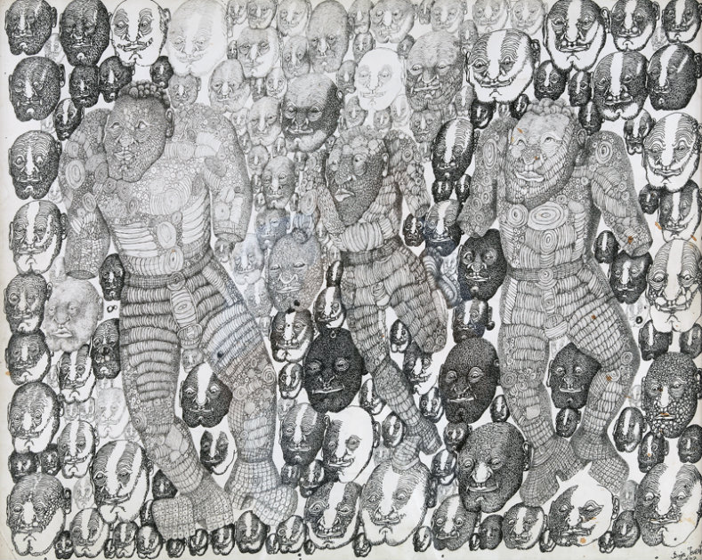 Jakić Vojislav, Bez naziva,1987.tuš-papir,50 x 62 cm